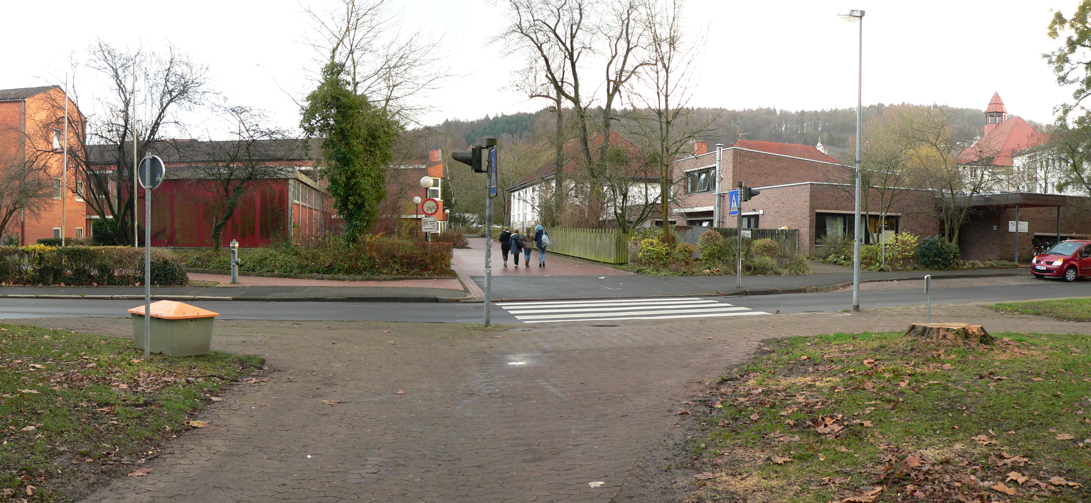 Hann Münden, Wilhelmstraße Ecke Parkstraße. Ungefährer Standort der früheren Fayence-Manufaktur Münden im Bereich der Realschule (links) und der Kindertagesstätte (rechts)